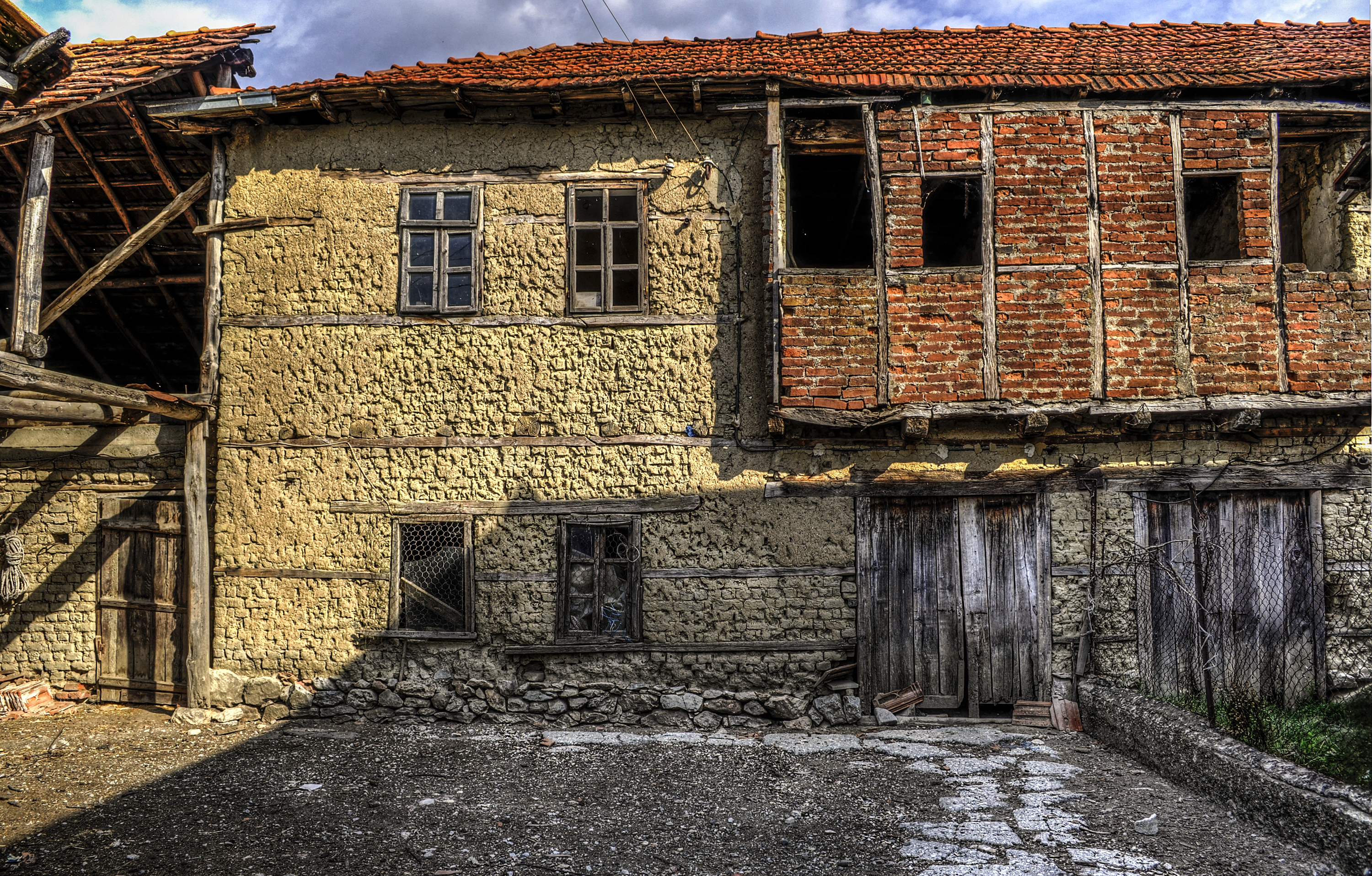 Стара куќа во селото Драслајца, Струшко